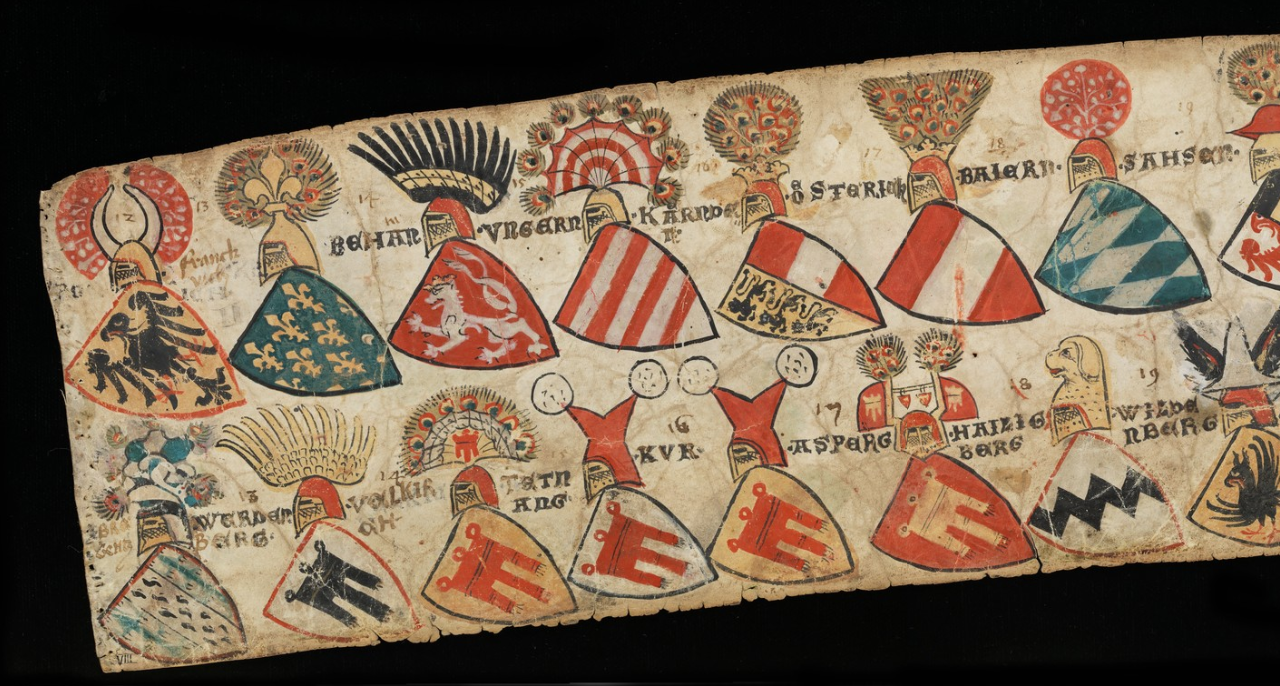 Zürcher Wappenrolle